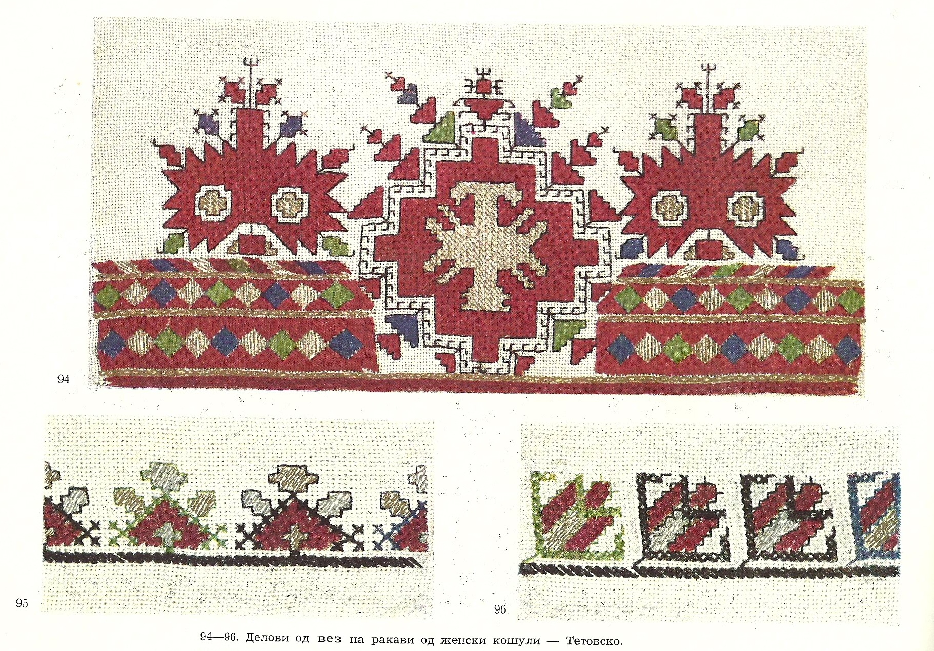 Македонски вез од тетовско